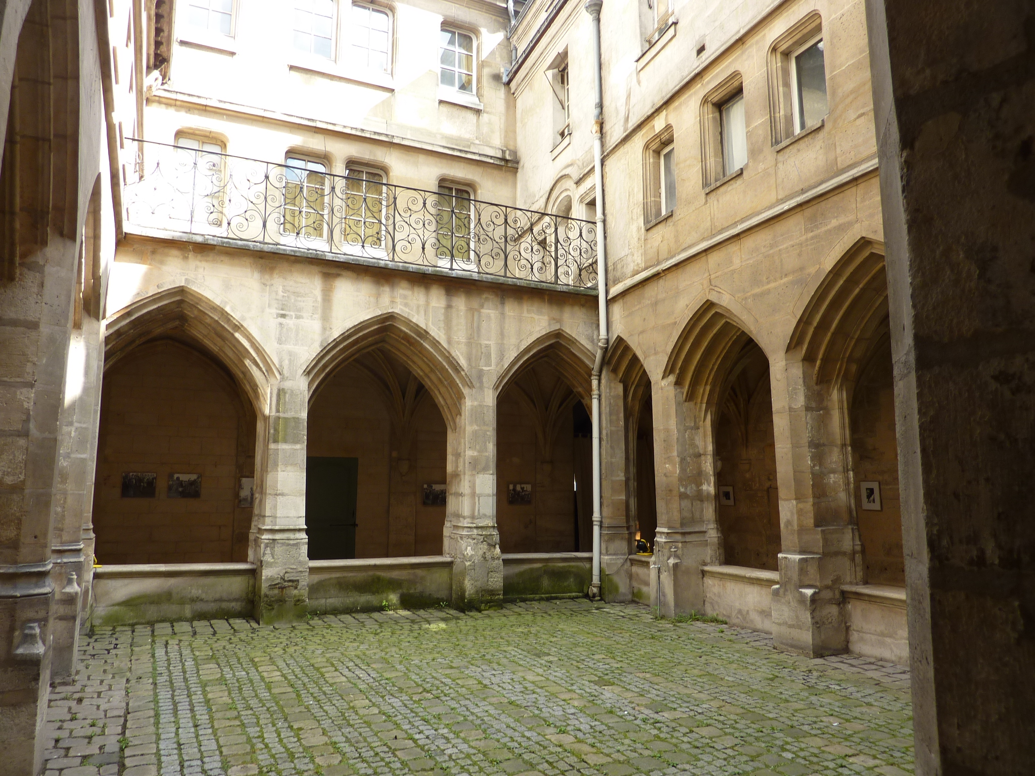 Cloister (Église des Billettes, Paris)